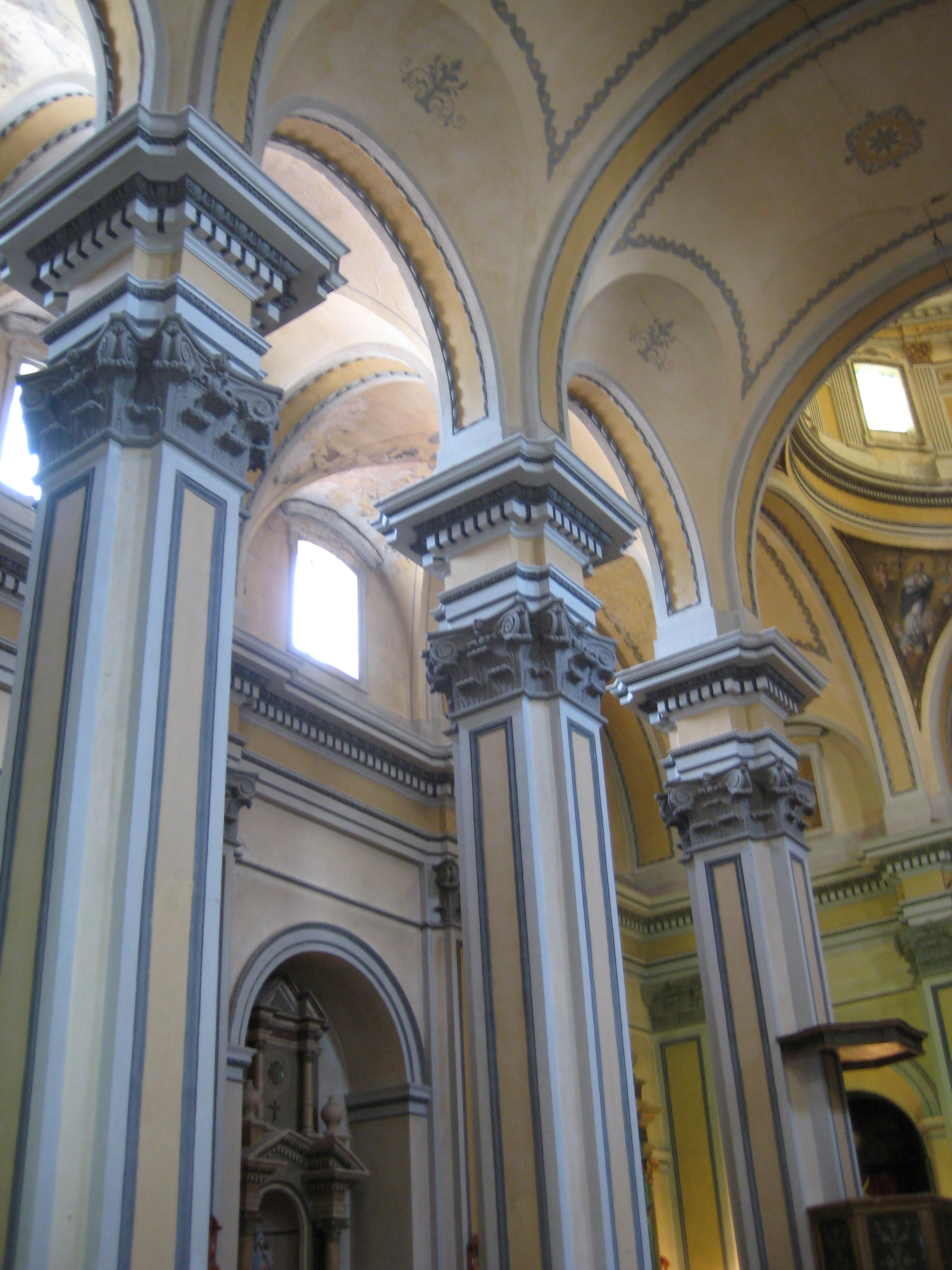 Interior de l'església de l'Assumpció de Suera (Plana Baixa)